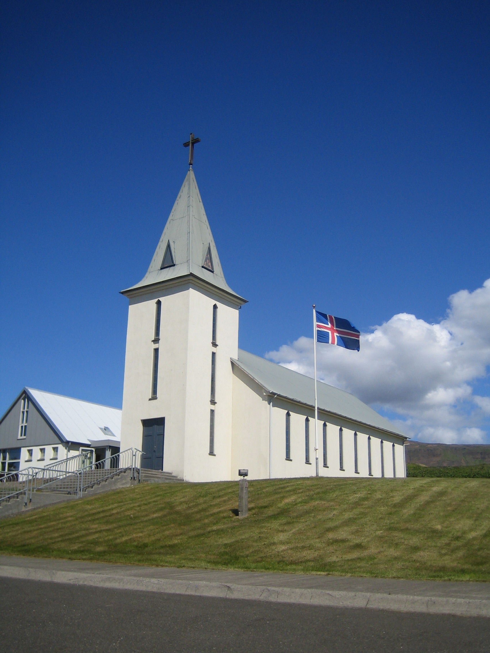 Hvammstangakirkja á Hvammstanga